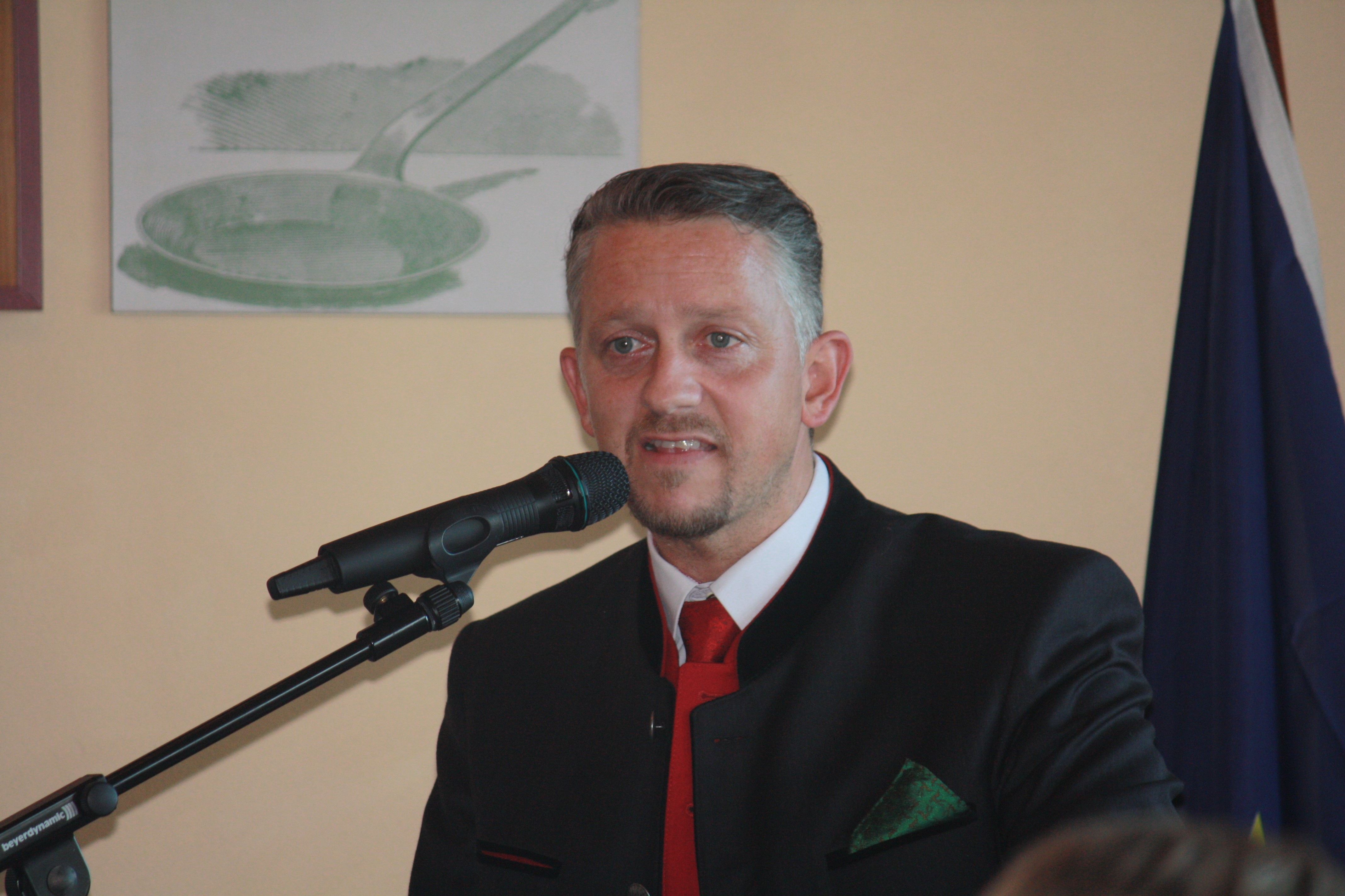 Thomas Huber, CSU-Landtagsabgeordneter